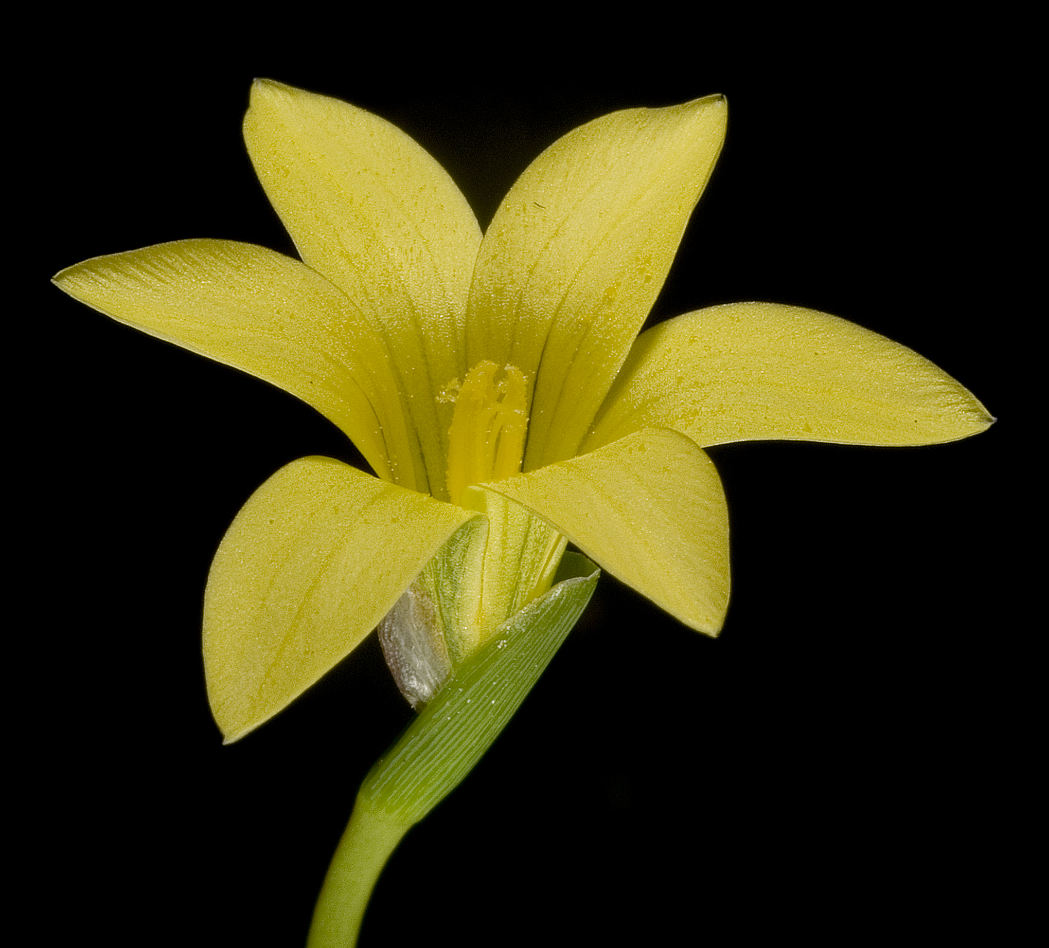 KRT3773